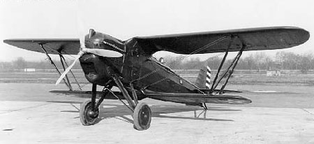 Berliner-Joyce P-16 (Y1P-16)